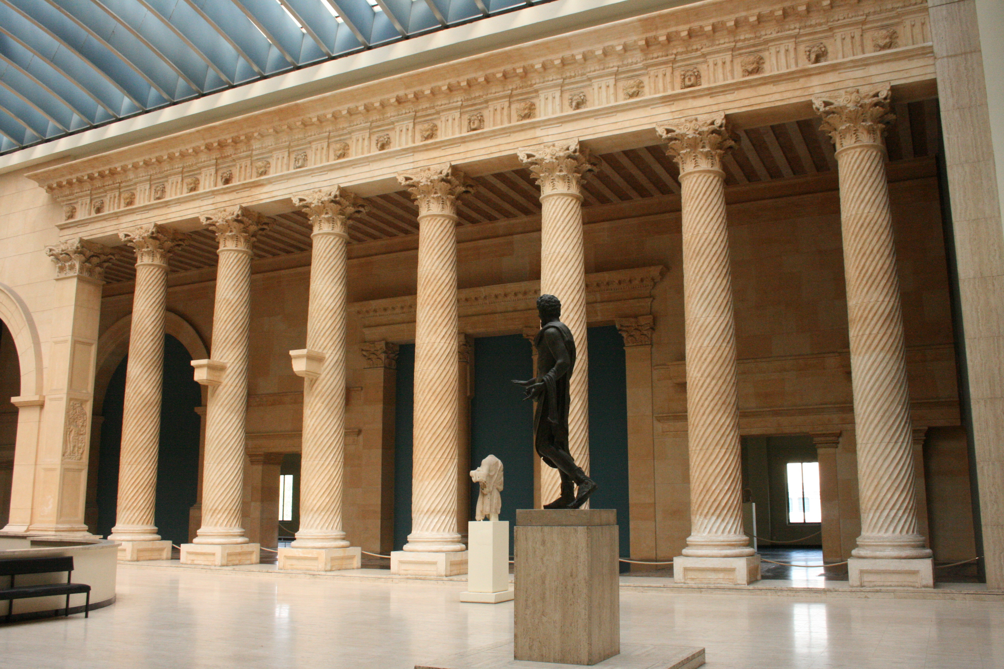 Grande Colonnade d'Apamée (Syrie). Musée du Cinquantenaire, Bruxelles (Belgique)